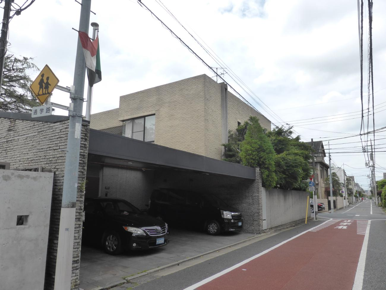 スーダン大使館全景